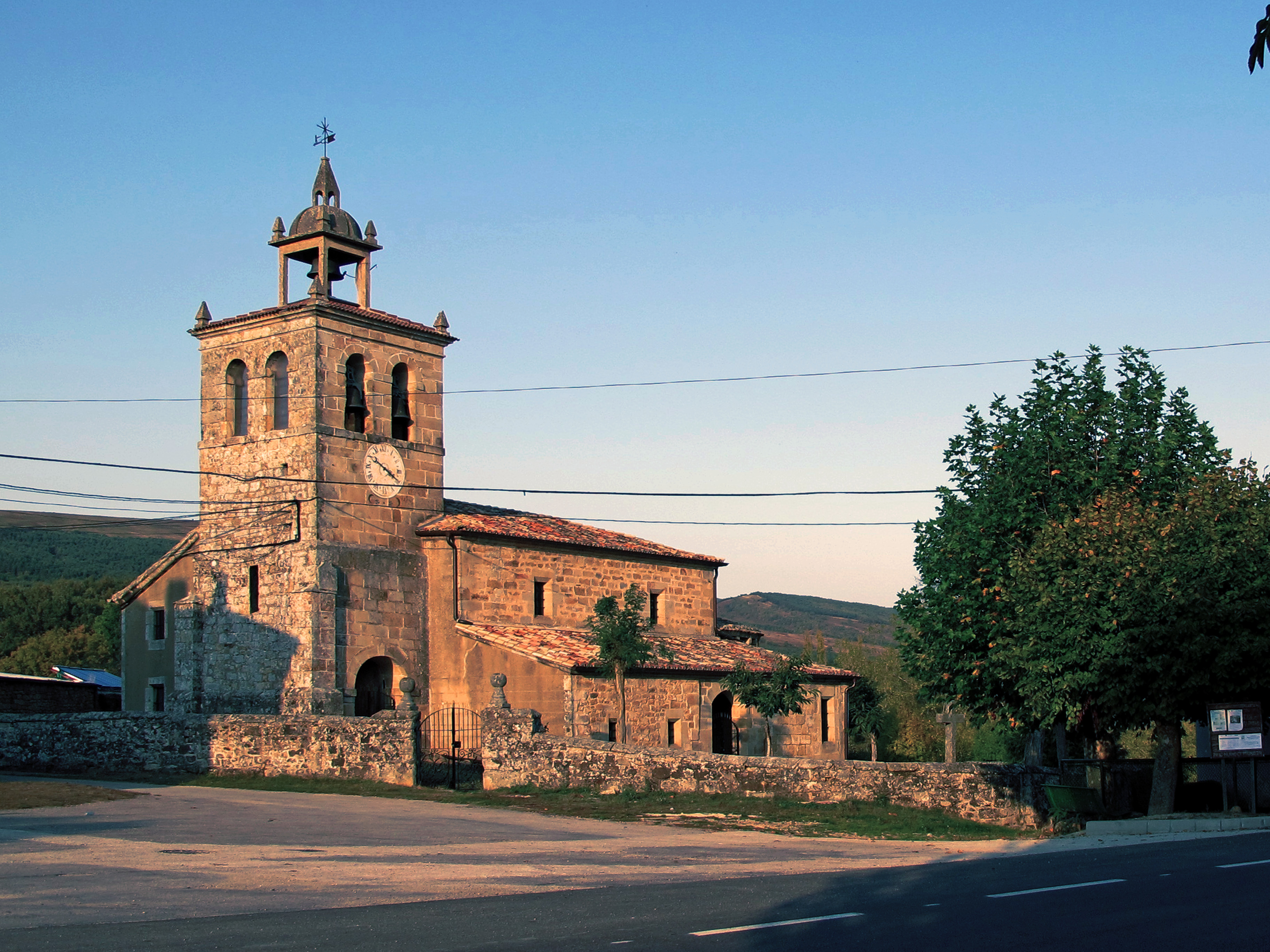 Iglesia de Santiago Apostol conserva su ábside románico y ha sido reformada varias veces. Esta en Quisicedo. del ayuntamiento de LA MERINDAD DE SOTOSCUEVA, en Burgos El nombre de QUISICEDO viene de “lugar de quejigos” esta enclavado en el Valle de Sotoscueva perteneciente a una comunidad de pueblos denominado como "las 7 Juntas del Valle" de terrenos comunales , con montes con plantación de robles autoctonos, acebos y matorral bajo. Esta foto participa en el juego En un lugar de Flickr